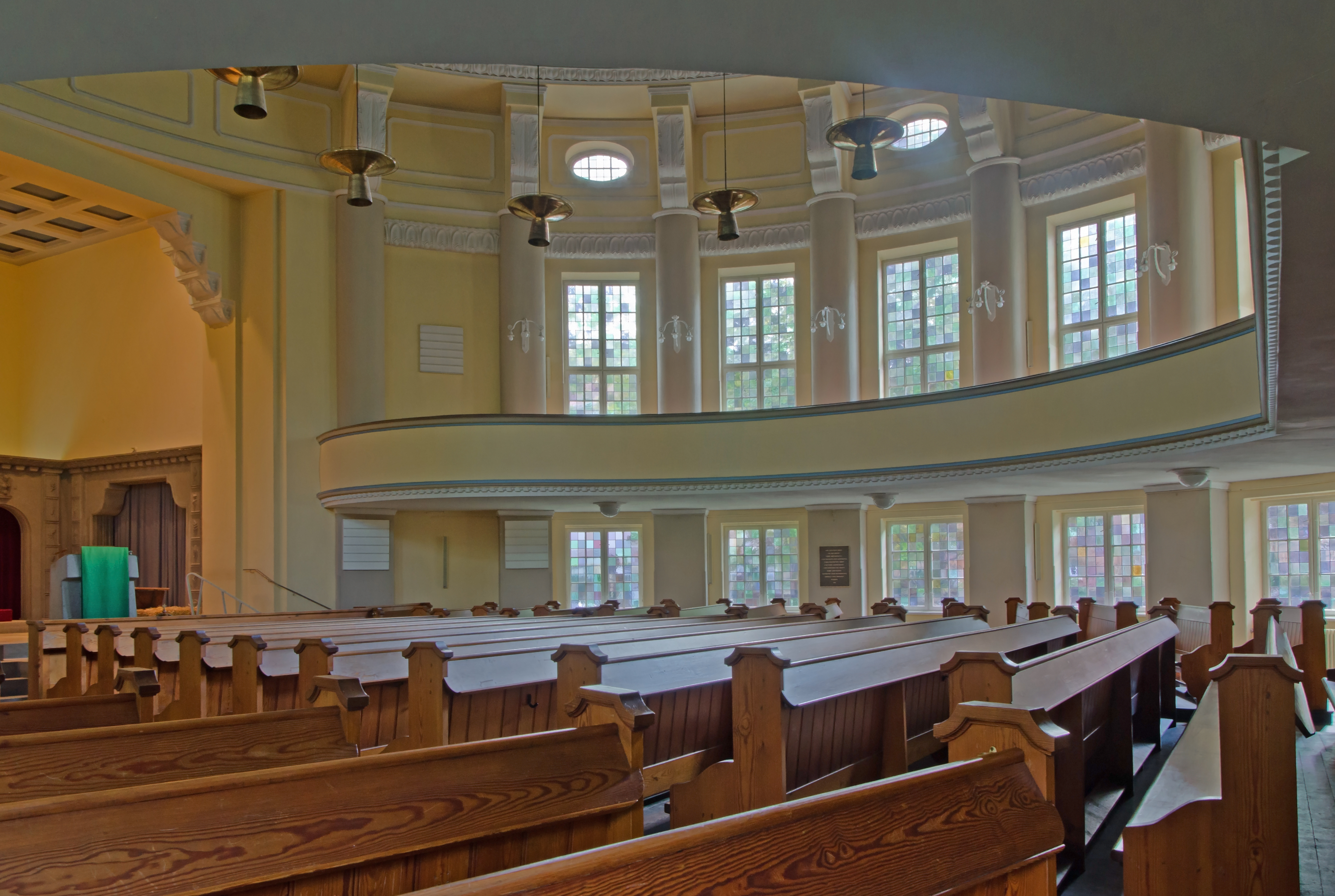 Hamburg Auferstehungskirche Barmbek Blick Richtung Süden